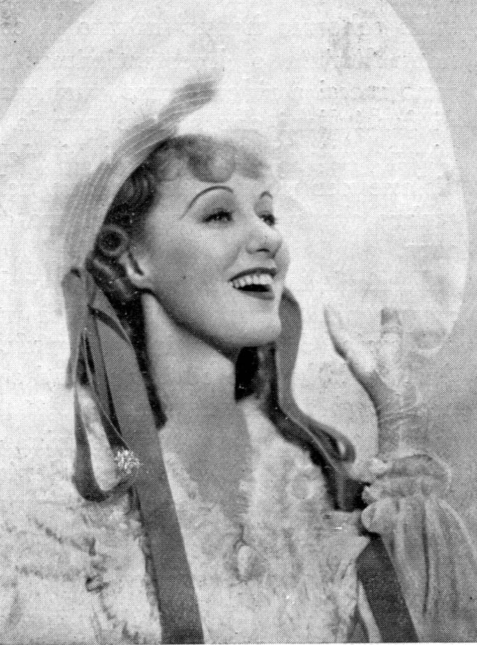 La cantante ed attrice Grace Moore in una immagine pubblicata in Italia nel 1936